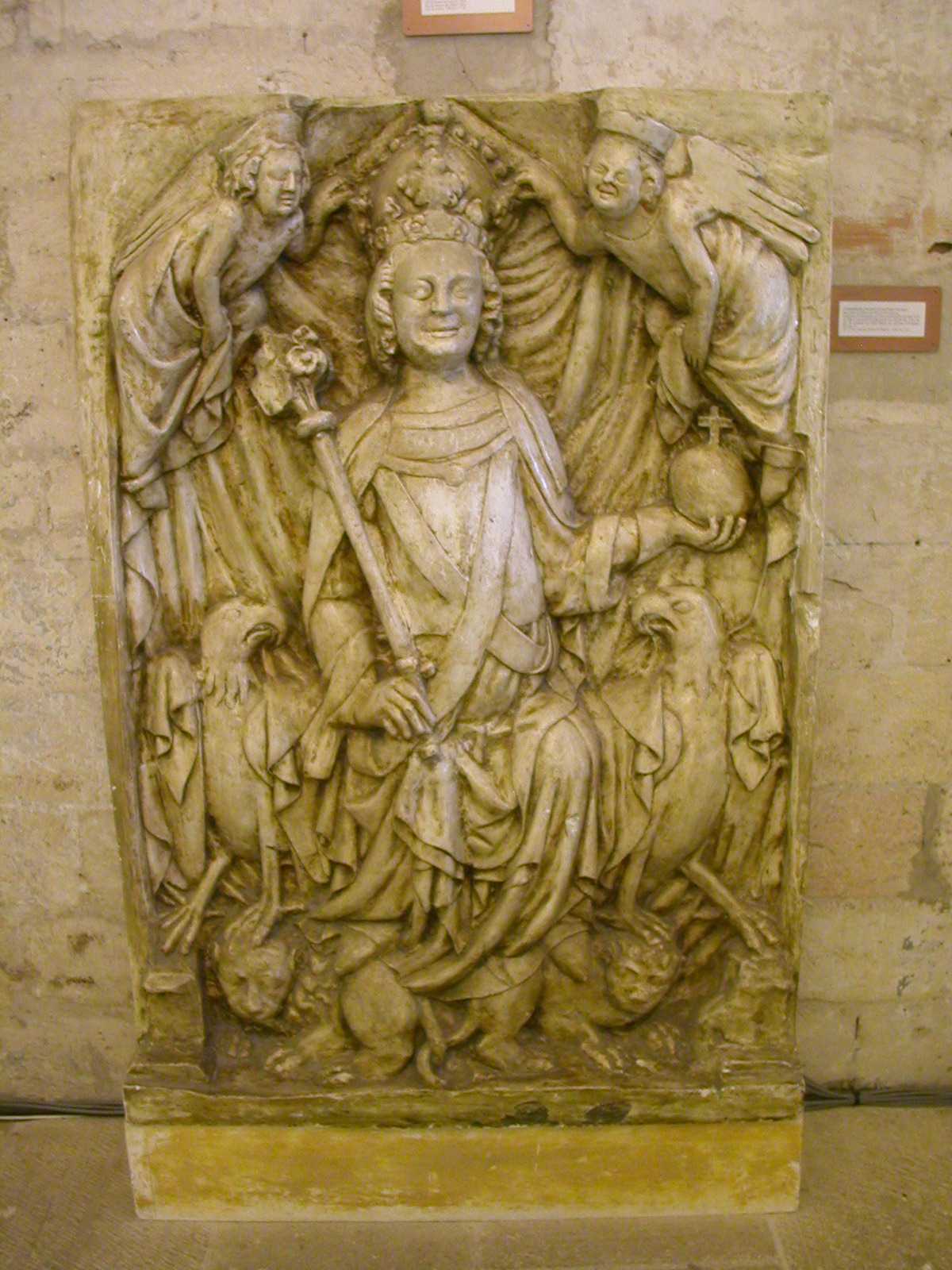 Bas-relief de Louis VI de Bavière, empereur germanique, au palais des papes d'Avignon